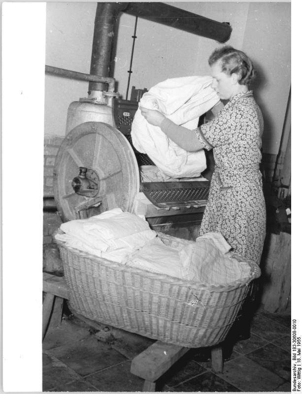 LPG Merxleben, Wäscherei der LPG Zentralbild TBD-Wittig-Schaar 18.5.1955 -2982- Bei den Genossenschaftsbauern der LPG "Walter Ulbricht" in Merxleben, Kreis Langensalza. Eine große Erleichterung für die Genossenschaftsbäuerinnen ist die Wäscherei der LPG, die auch anderen Dorfbewohnern zur Verfügung steht. Irmgard Gutjahr an der Doppeltrommelwaschmaschine.